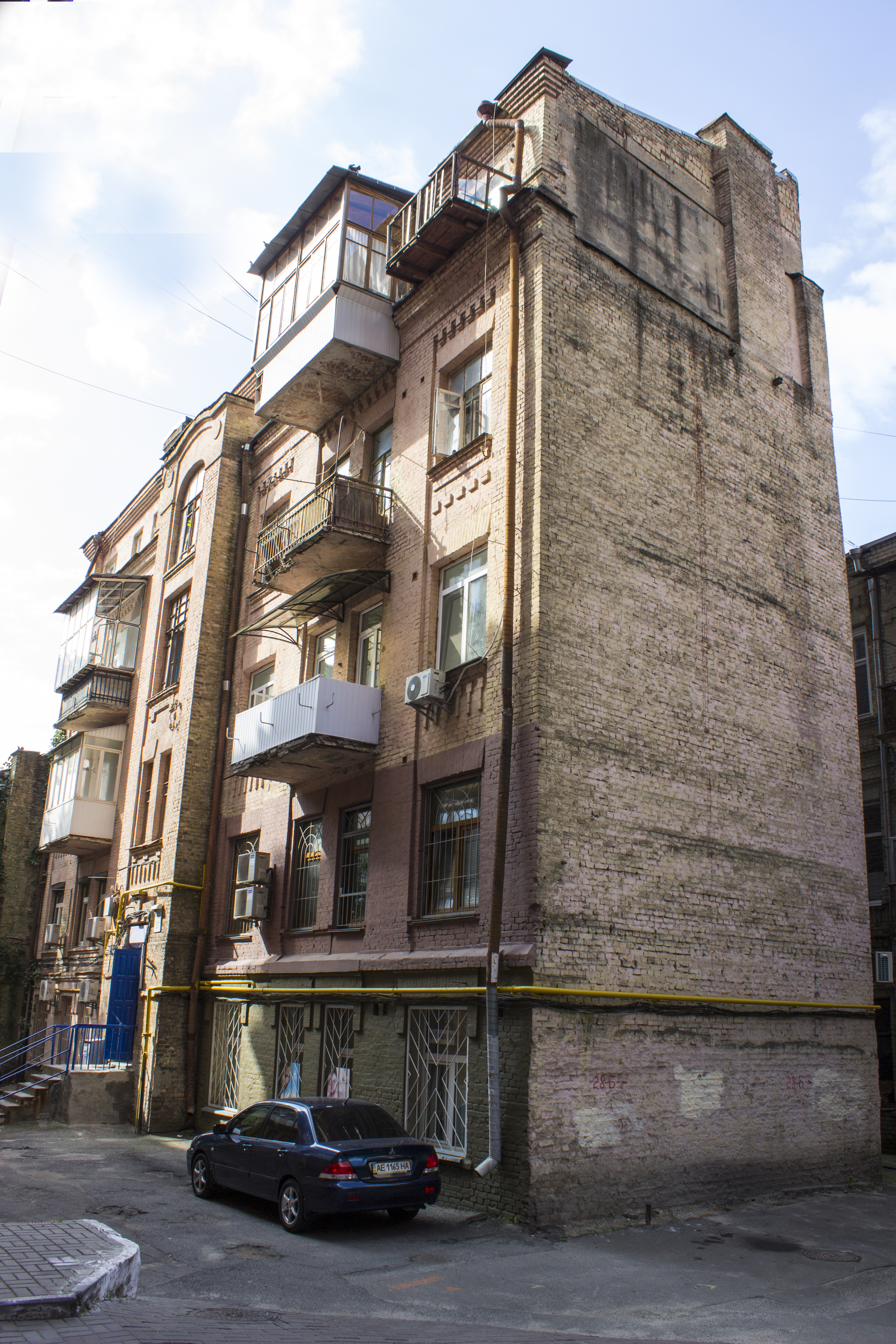 Флігель, де мешкали Л. О. Яновська, В. В. Радзимовська, Київ, Гончара Олеся вул., 30-в